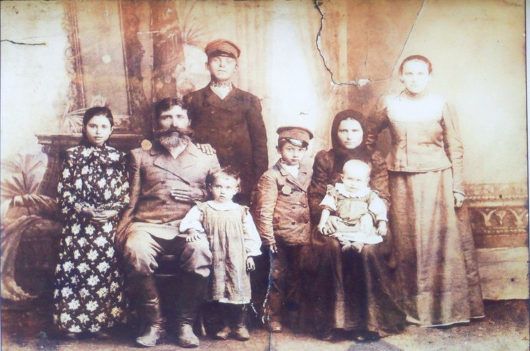 Криворізький староста Лапін П.Б. з родиною . Фото початок 20 ст.